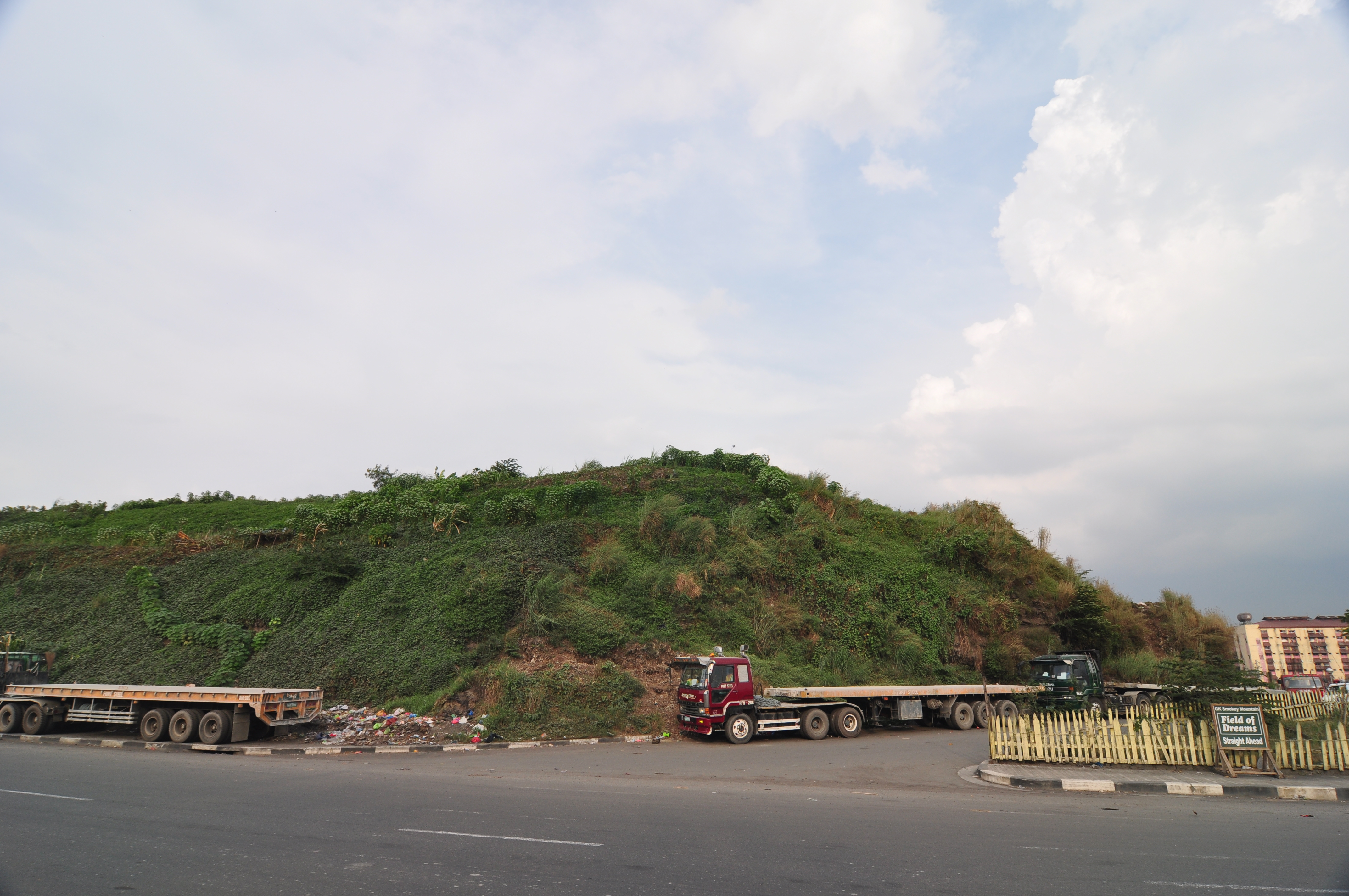 Smokey Mountain in Manila, Philippines